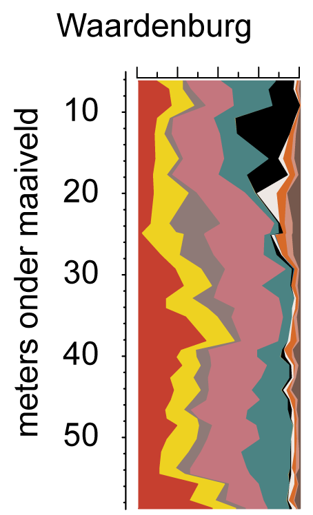 Zware mineralen diagram van boring Waardenburg, Nederland (zonder verklaring)